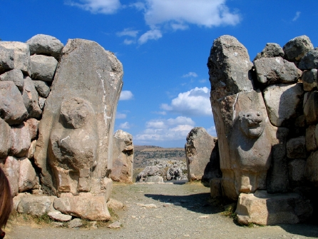 loewentor-hattusa